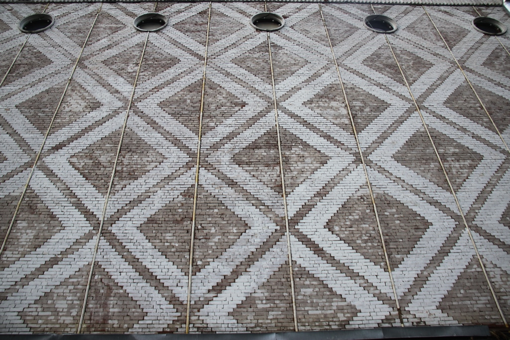 Москва, закрытый кинотеатр "Ленинград"